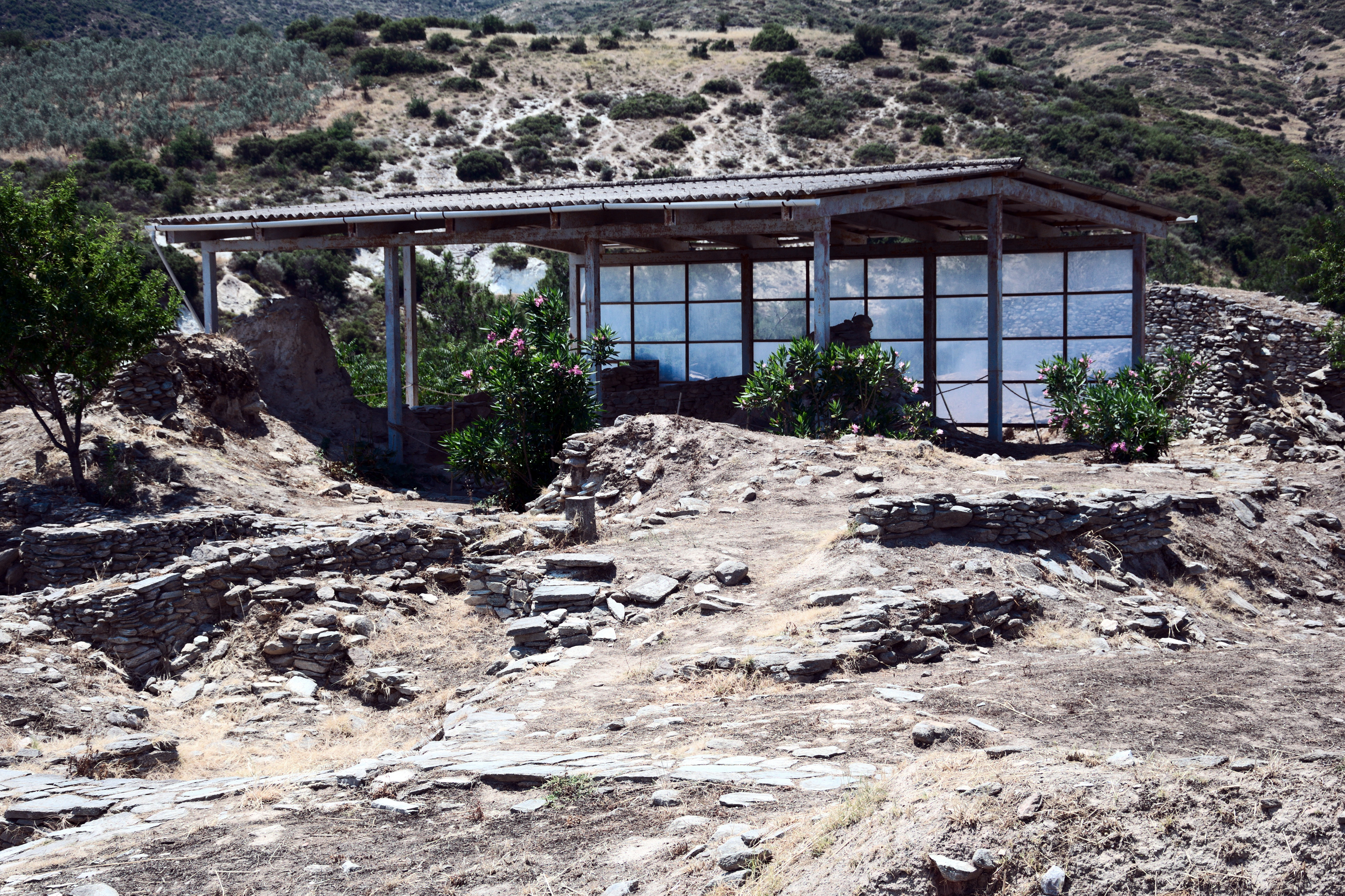 Οικία του Κεραμέα στο Σέσκλο«Οικία του Κεραμέα στο Σέσκλο»